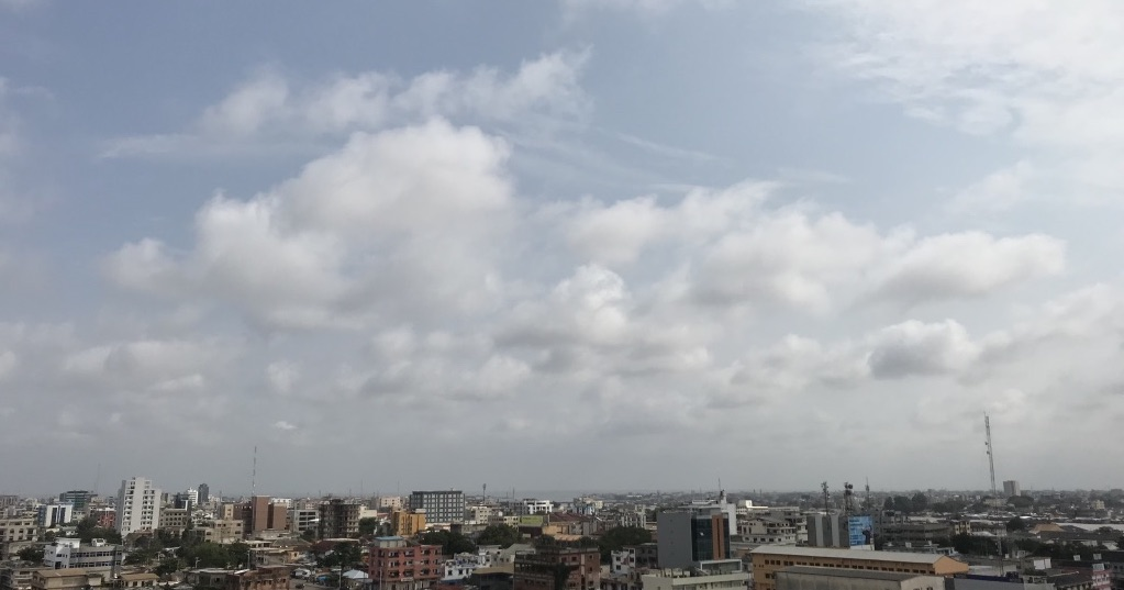 Centre-ville de Cotonou